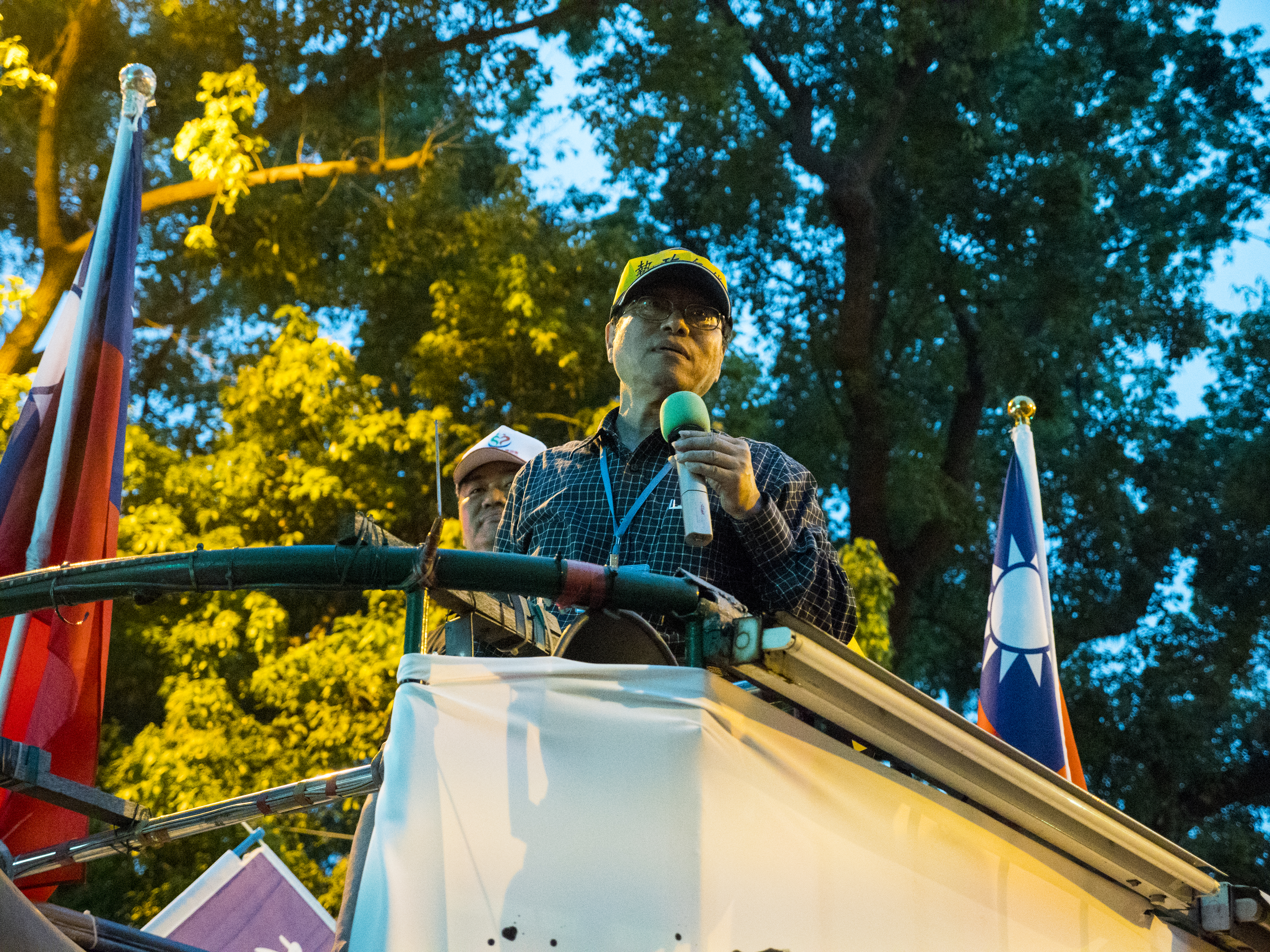 419反年金改革抗議